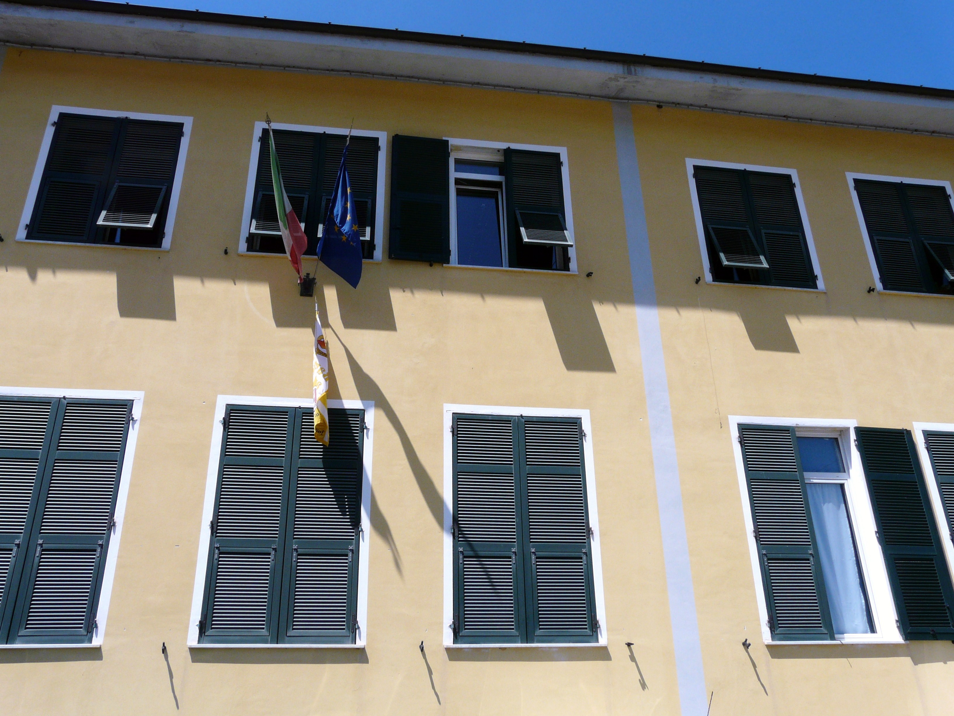 Il municipio, Pignone, Liguria, Italia